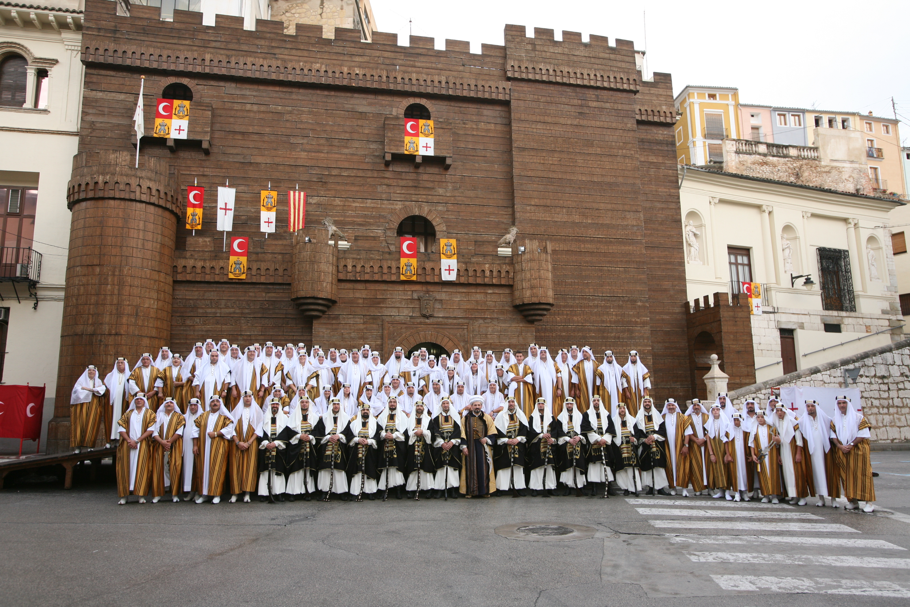 Comparsa Saudites d'Ontinyent a las puertas del castillo en el año de capitania 2007